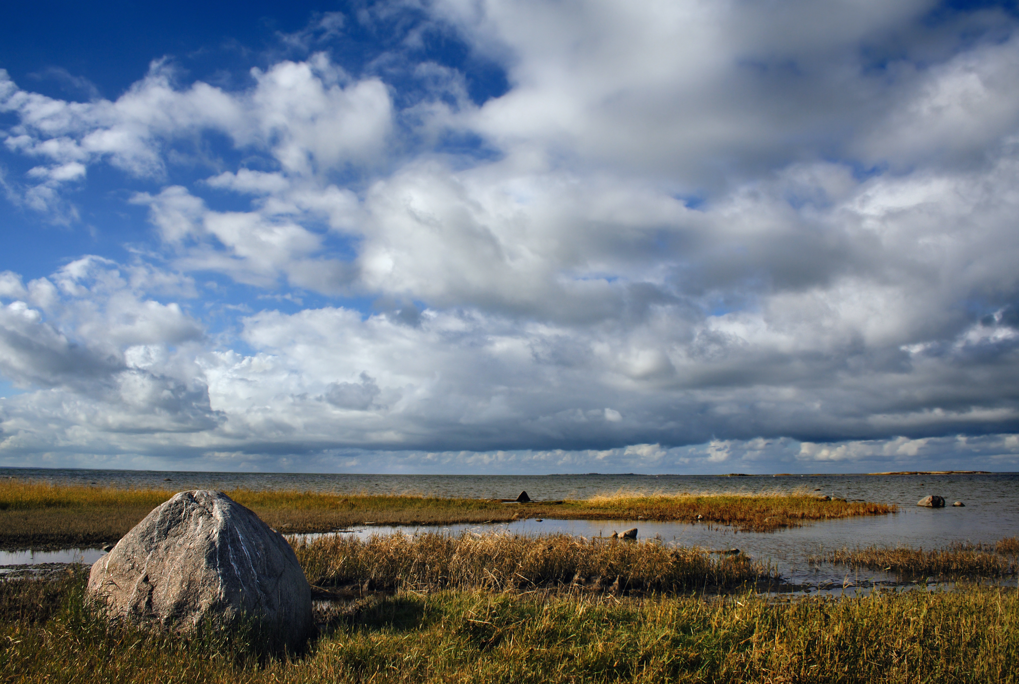 Üksikud kivid Puise poolsaare tipus